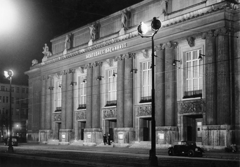 Berlin; Deutsches Opernhaus, Bismarkstrasse. Am Abend 1936